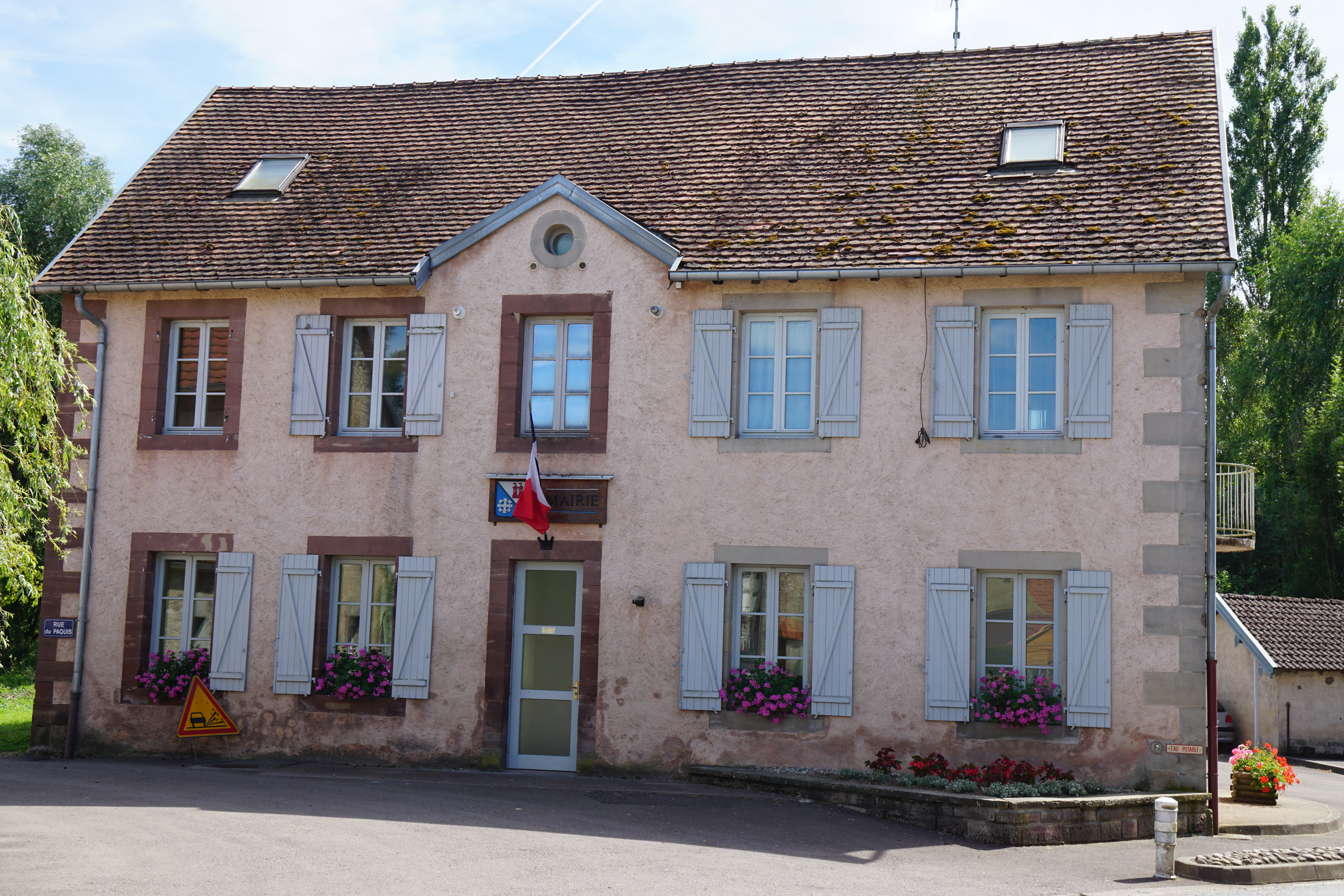 La mairie de Sainte-Marie-en-Chaux.